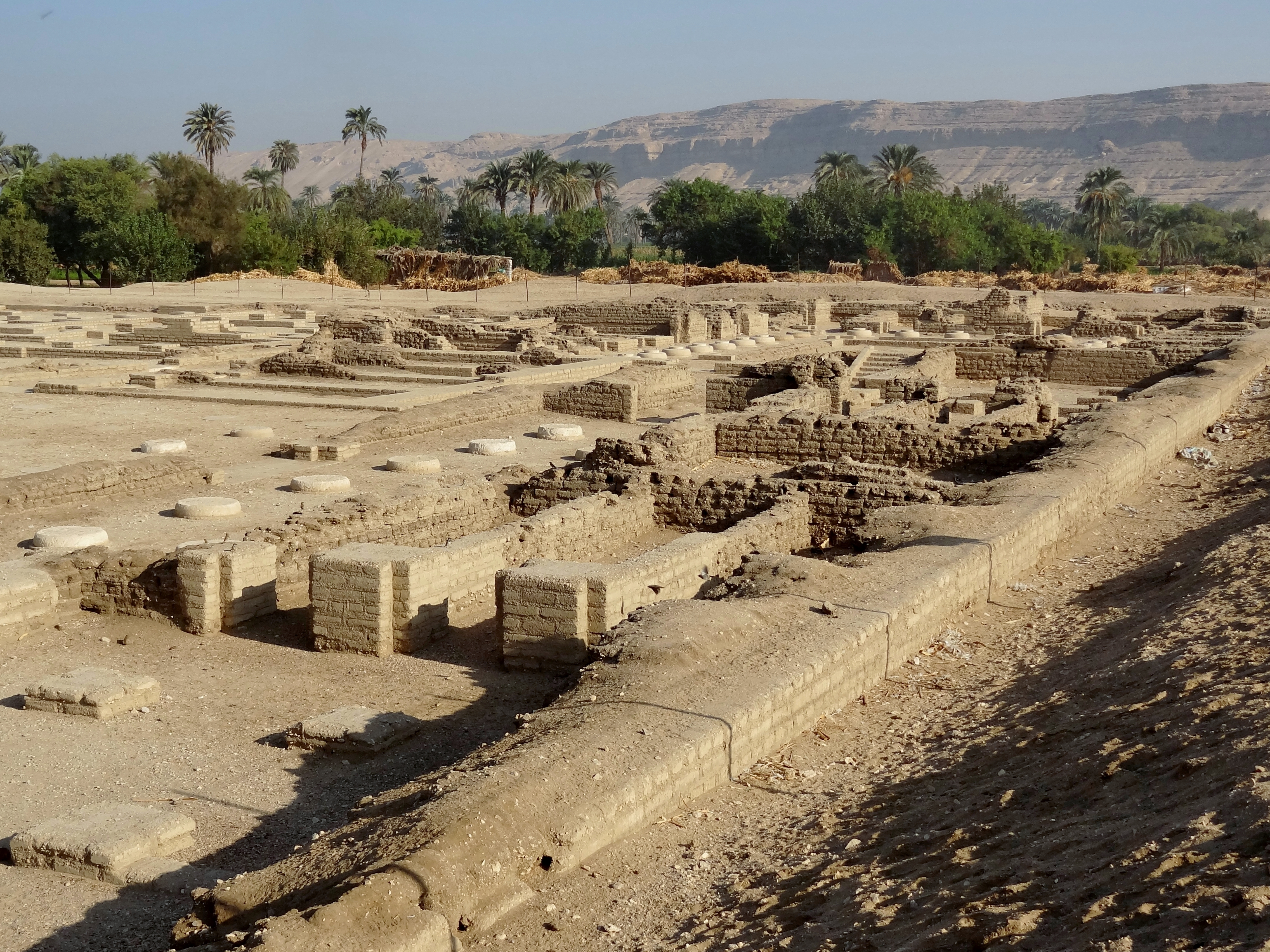 Nordpalast von Tell el-Amarna, Ägypten